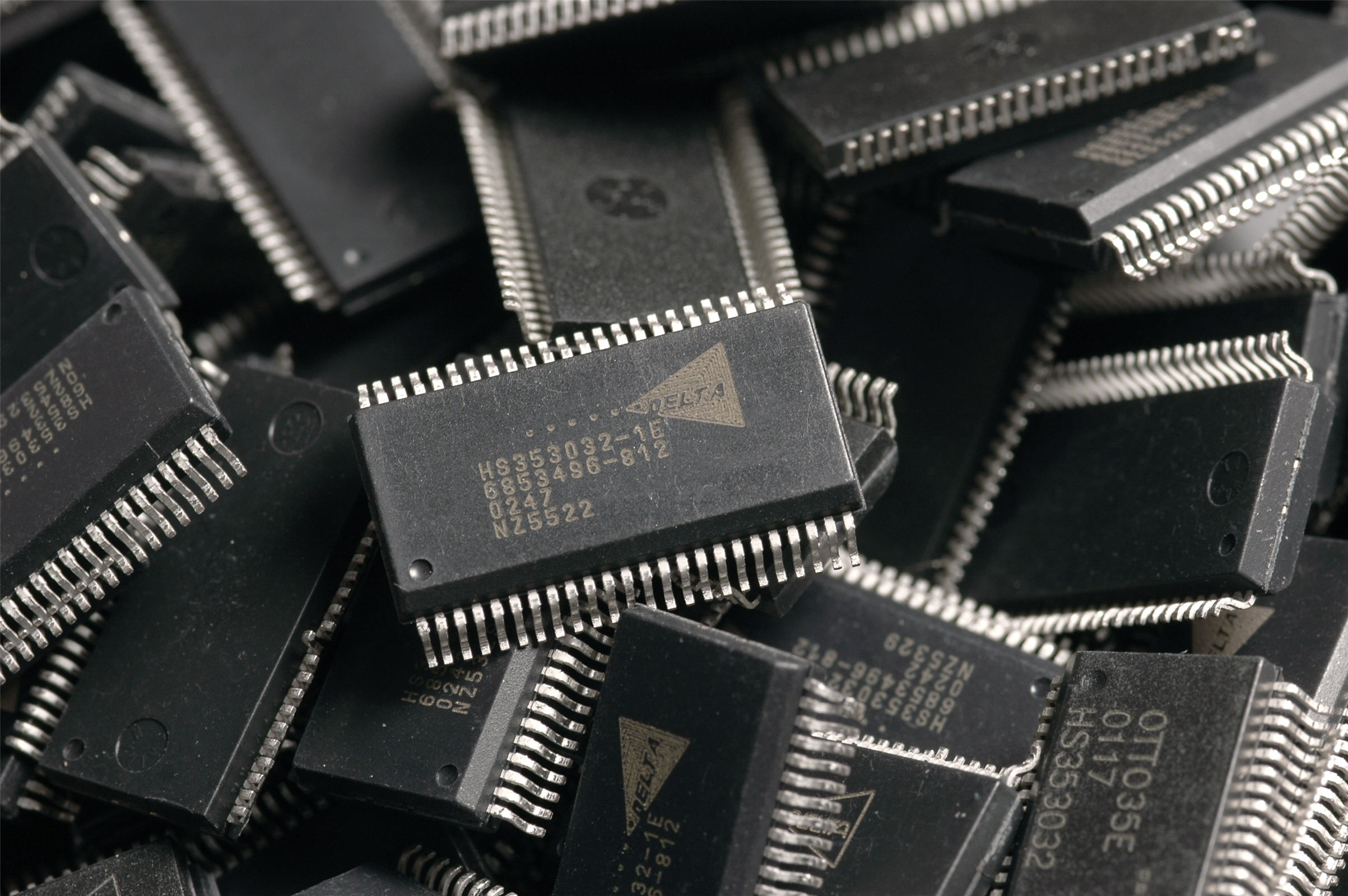 Picture of microchips, made by DELTA Microelectronics